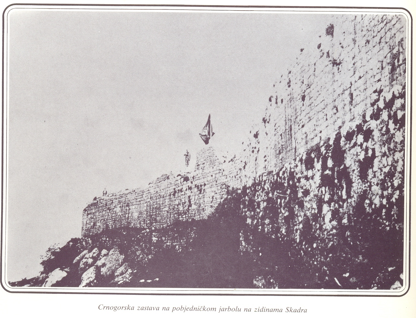 Crnogorska zastava na Skadarskoj tvrđavi.